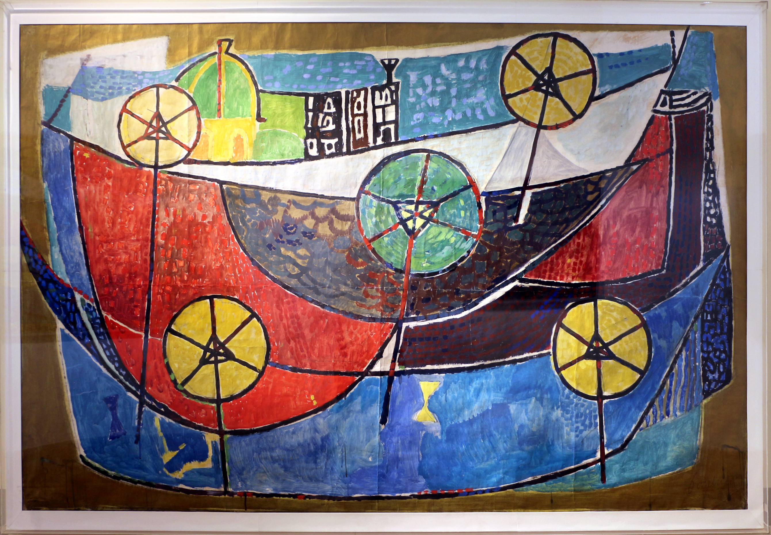 Collezione Mosaici Moderni - NB: Museum explicitly authorized the upload of its contemporary art collection for WLM 2016 (for further info ask WLM Italy organizators). This is a photo of a monument which is part of cultural heritage of Italy.